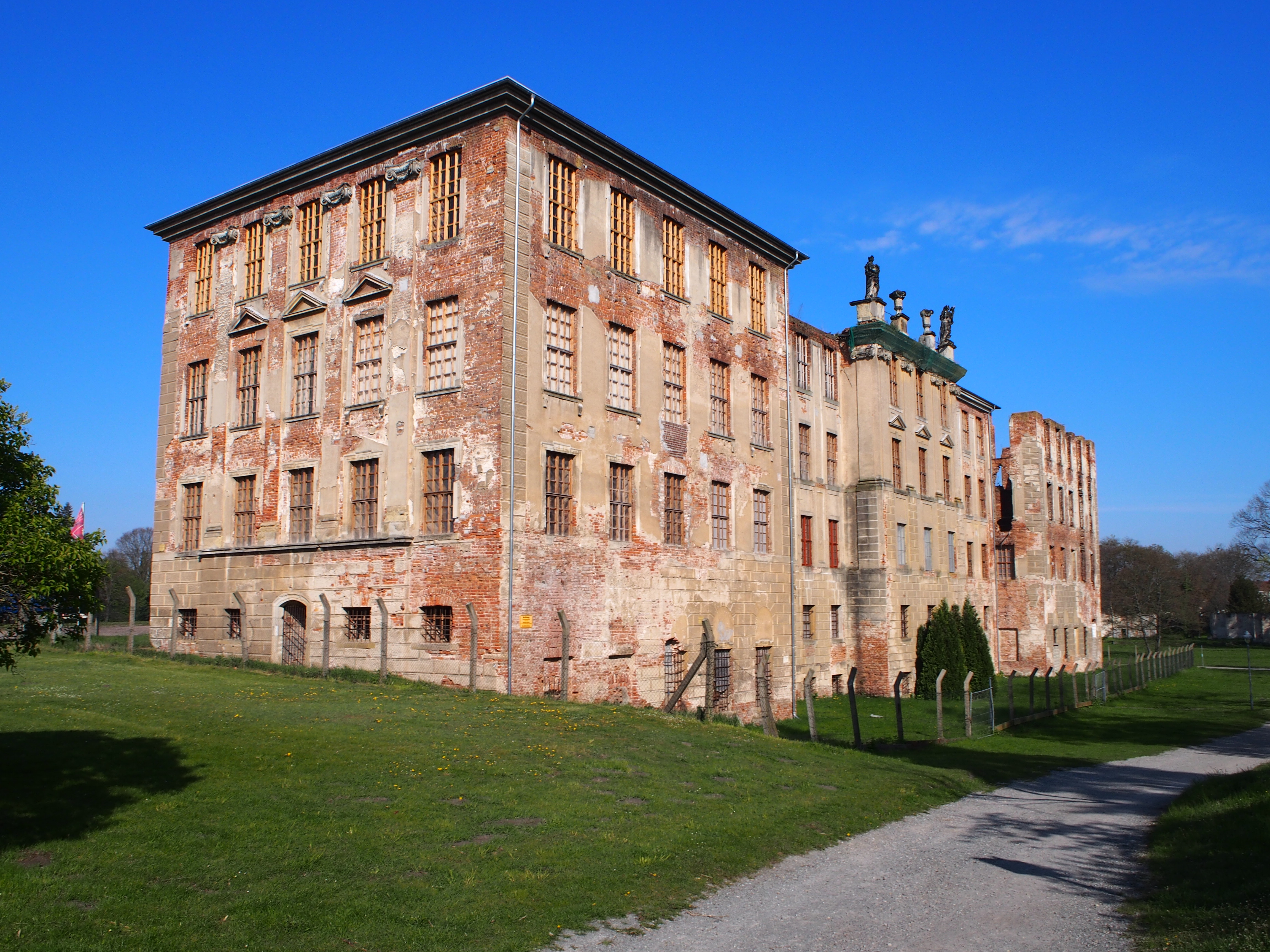 Sachsen-Anhalt, Zerbst: Das Schloß wurde in 2. Weltkrieg durch Bomben beschädigt und nach dem Krieg größtenteils abgerissen. Nur der Ostflügel existiert noch; er wurde aber noch nicht restauriert.